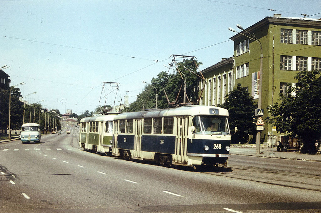 Pärnu maantee kesklinna poole suunduv ots, paremal Tallinna 20. Keskkool, keskel tramm Tatra T4.